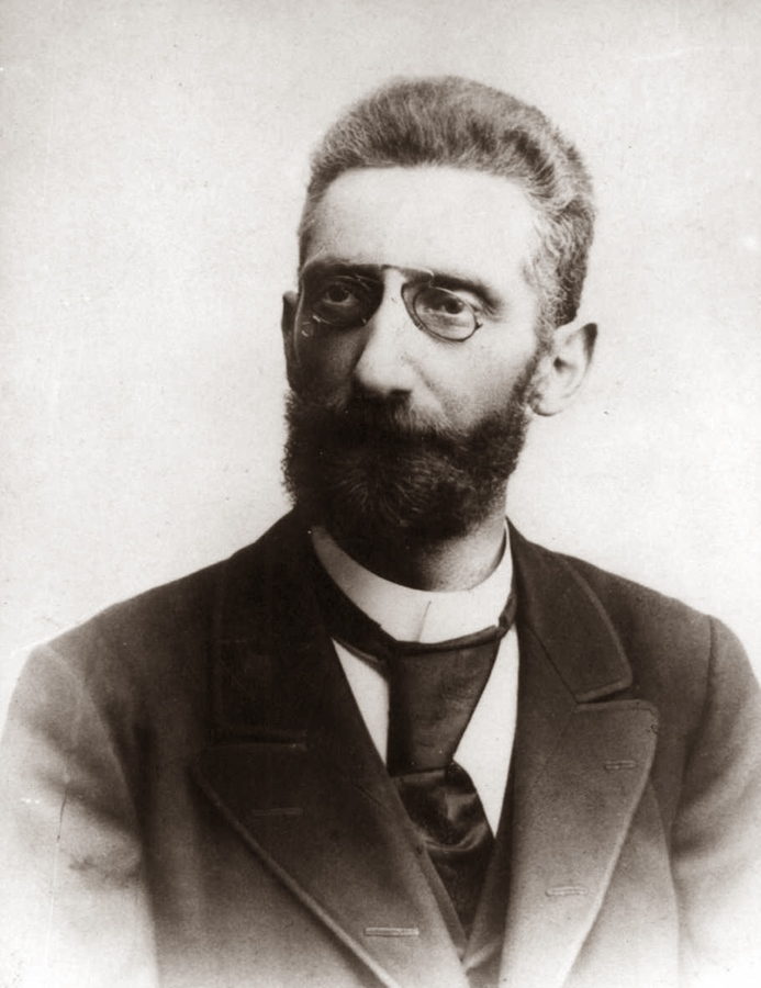 Siegmund Markusfeld (1847–1903) – adwokat, działacz społeczny., Bielsko